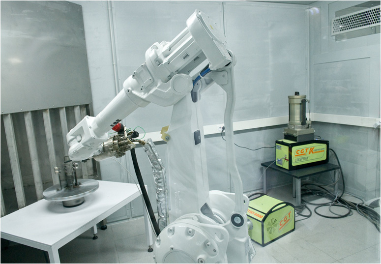 Robot que, a velocitats superiors a la del so, produeix pròtesis de materials biocompatibles per projecció tèrmica freda destinades al mercat biomèdic. Introdueix noves tecnologies d’enginyeria de superfícies i desenvolupament de pròtesi